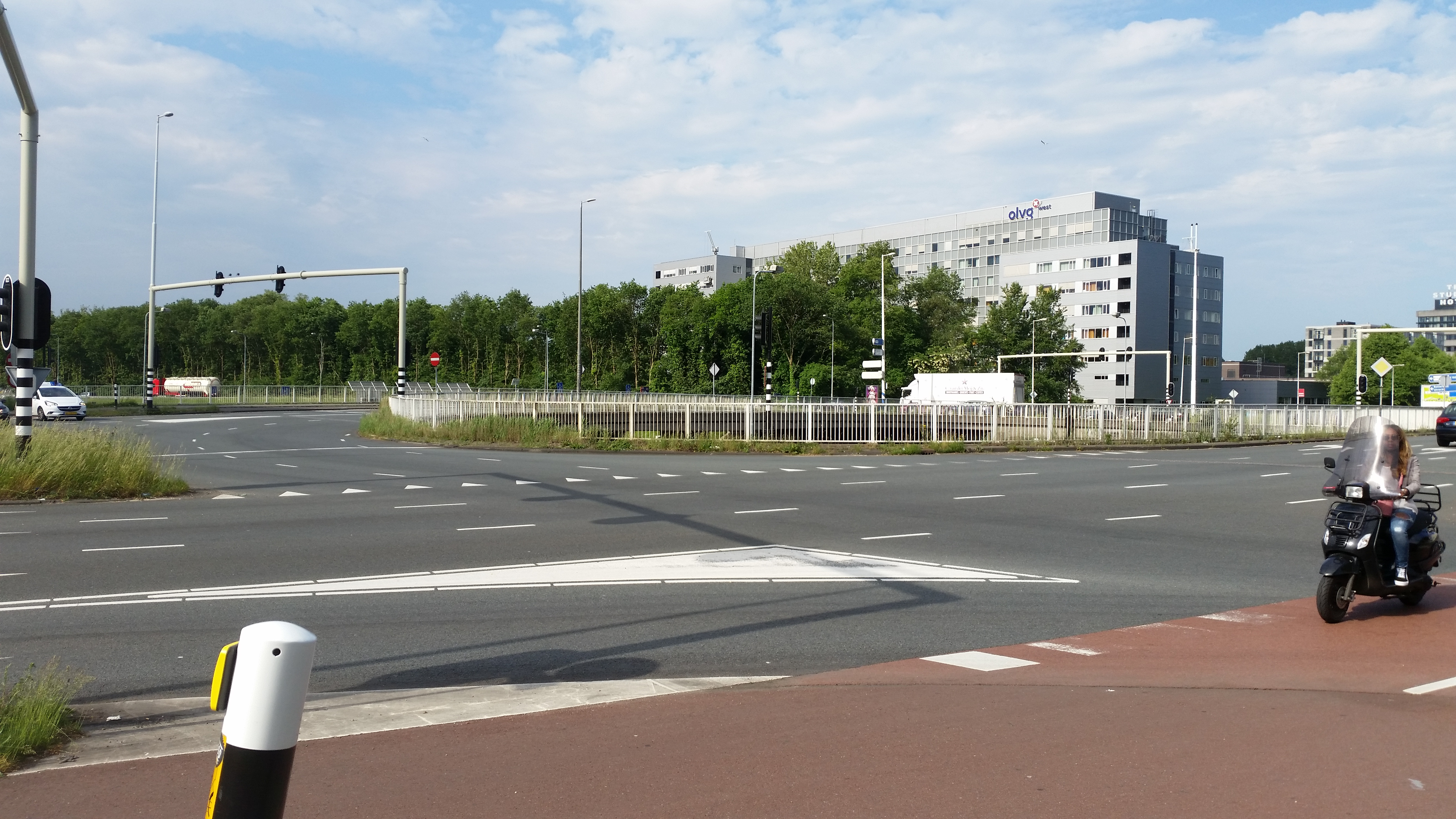 Aansluiting Amsterdam-Geuzenveld, Amsterdam, overzicht